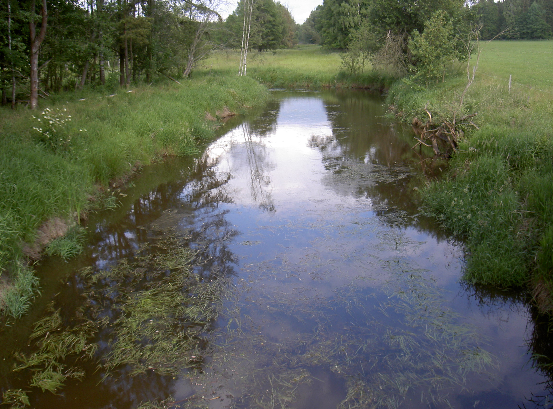 Die Pfreimd bei Pfrentschweiher